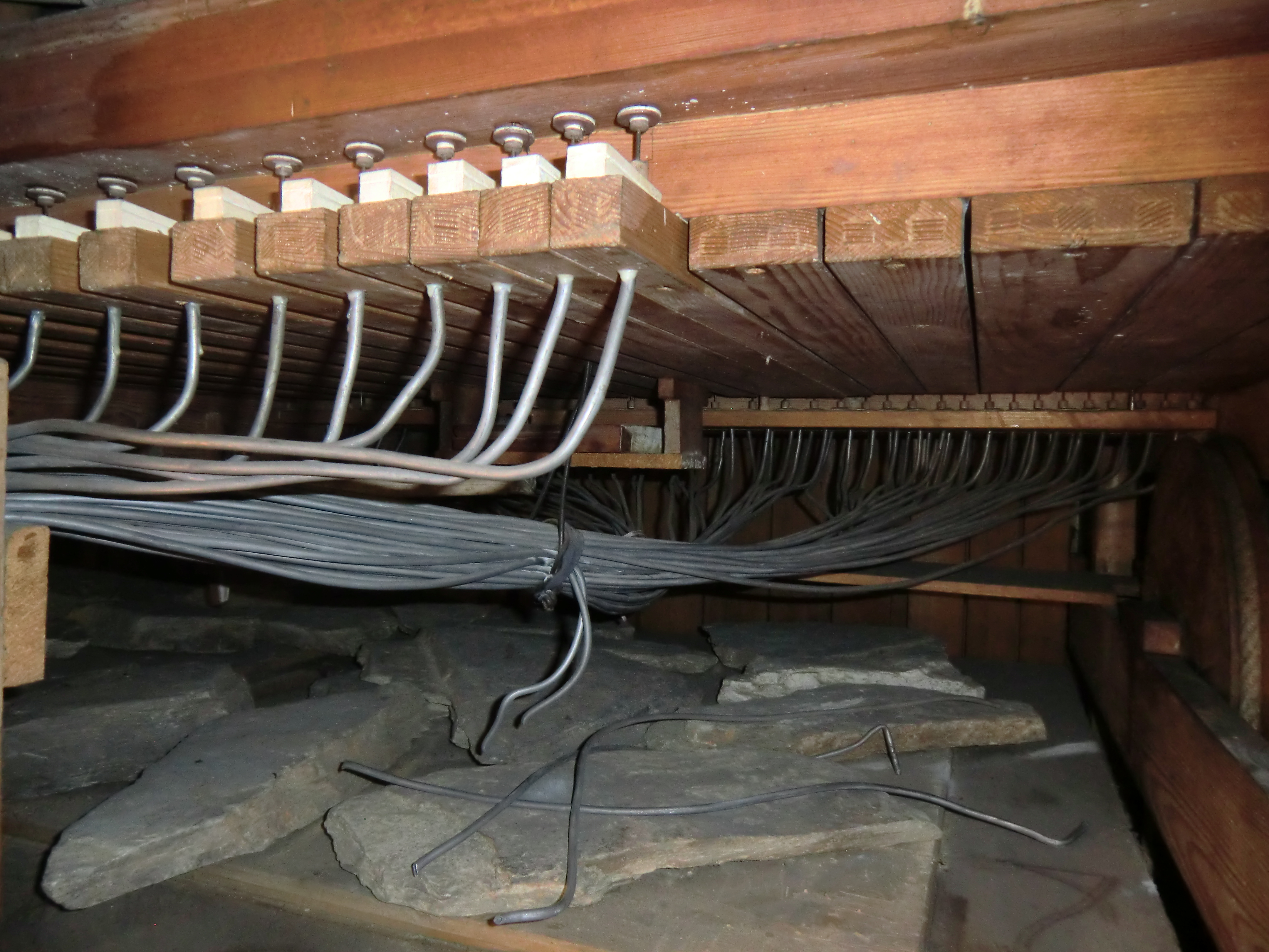 Horn-Orgel in Ransel (1912) - Pneumatik I. Man. und Magazinbalgsteine